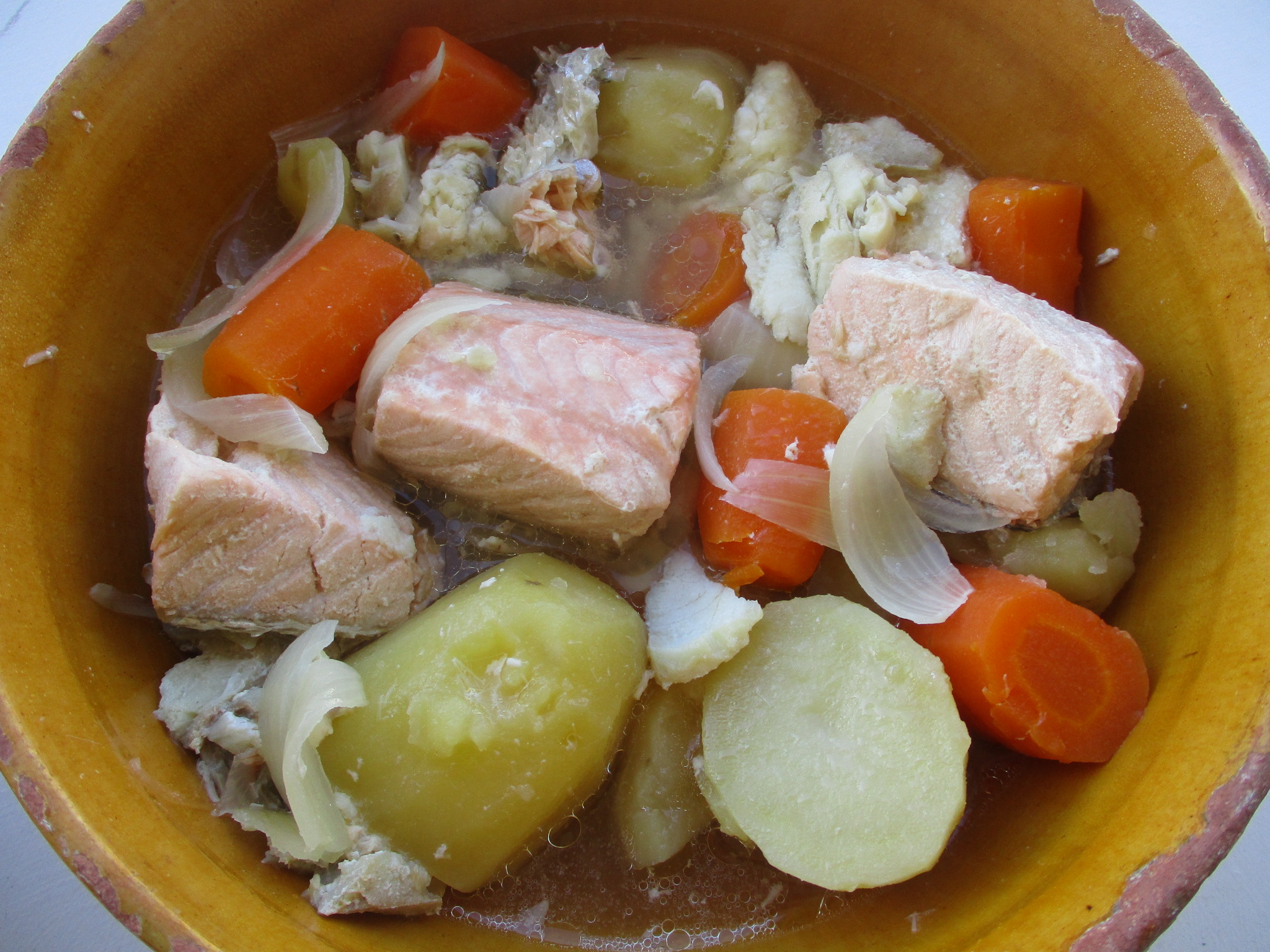 Matelote alsacienne au vin riesling d'Alsace (saumon, sandre, brochet, anguille, truite, carpe...) carotte, pomme de terre, oignons